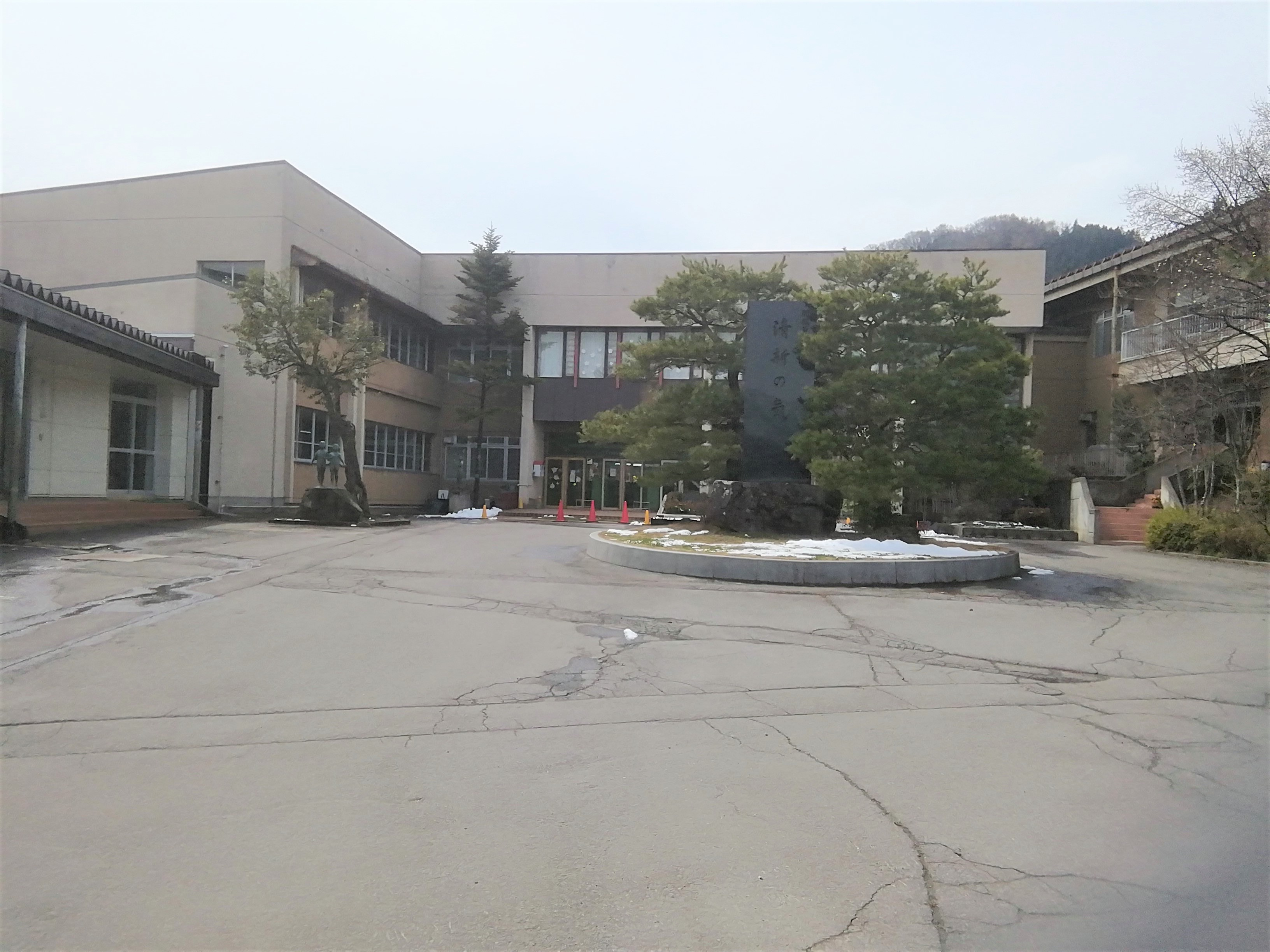 中野市立豊井小学校（2020-3-30）